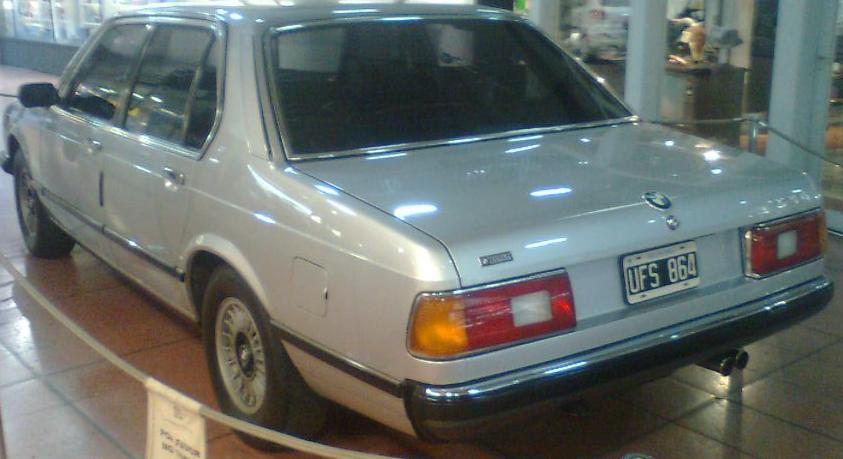 BMW 728i en Argentina